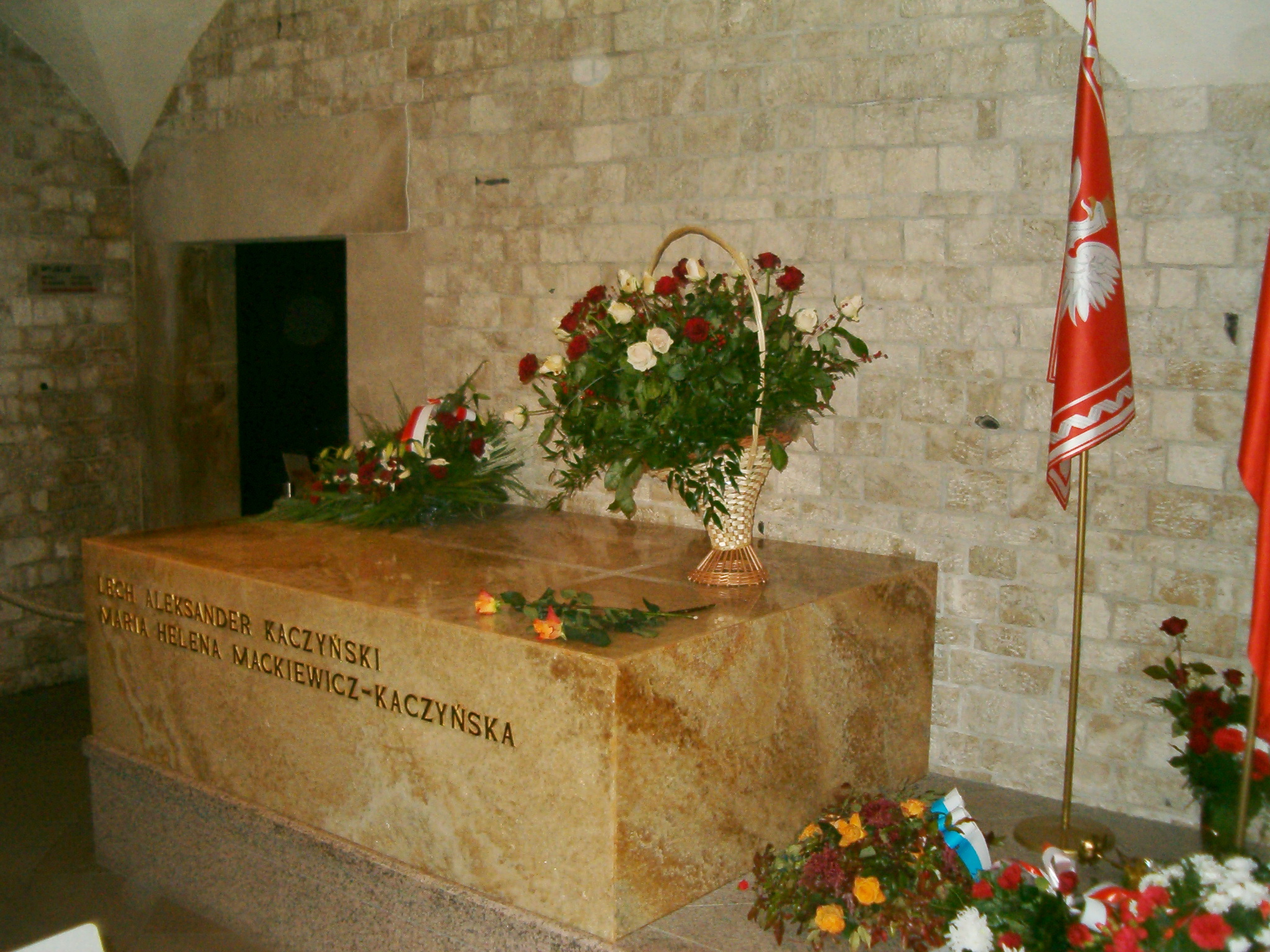 Sarkofag Lecha i Marii Kaczyńskich w Królewskiej Katedrze na Wawelu